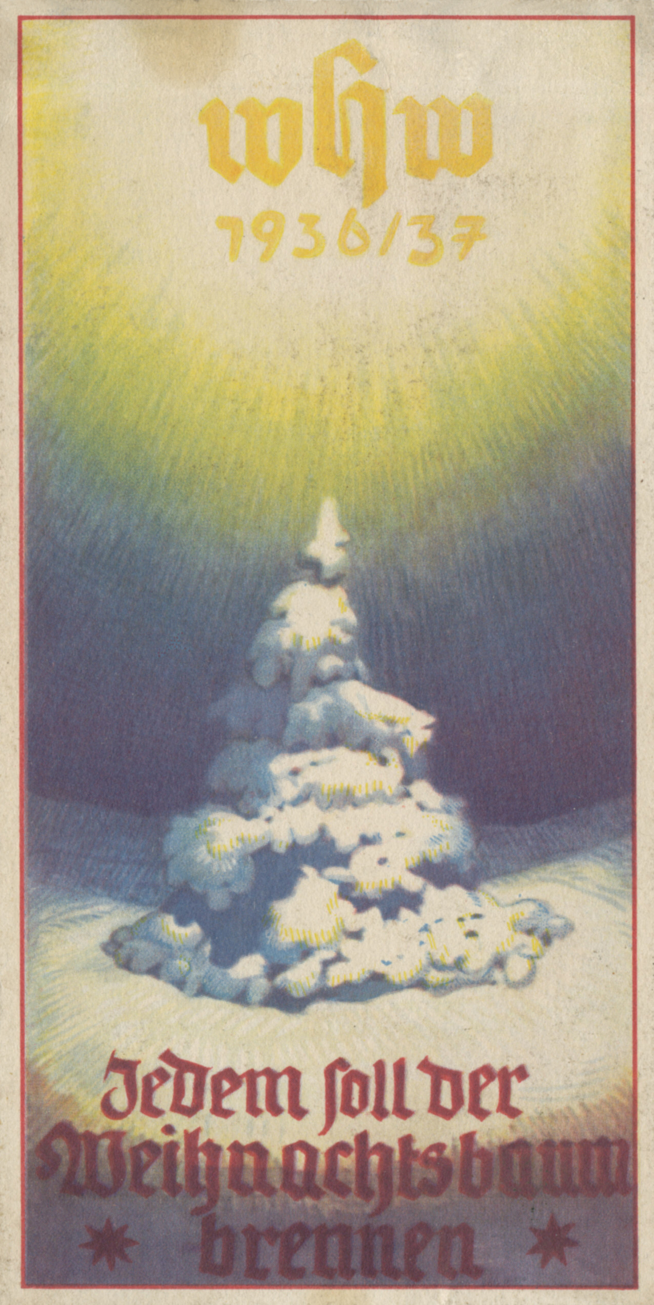 Türplakette des Winterhilfswerks (WHW), Weihnachtssammlung 1936 - 1937, mit der Aufschrift: "whw 36/37 - Jedem soll der Weihnachtsbaum brennen". Diese Plaketten wurden gegen eine Spende für das WHW verteilt. (aus der Ausstellung "Weihnachtszeiten" des Aachener Bild und Tonarchivs e.V., Dezember 2011